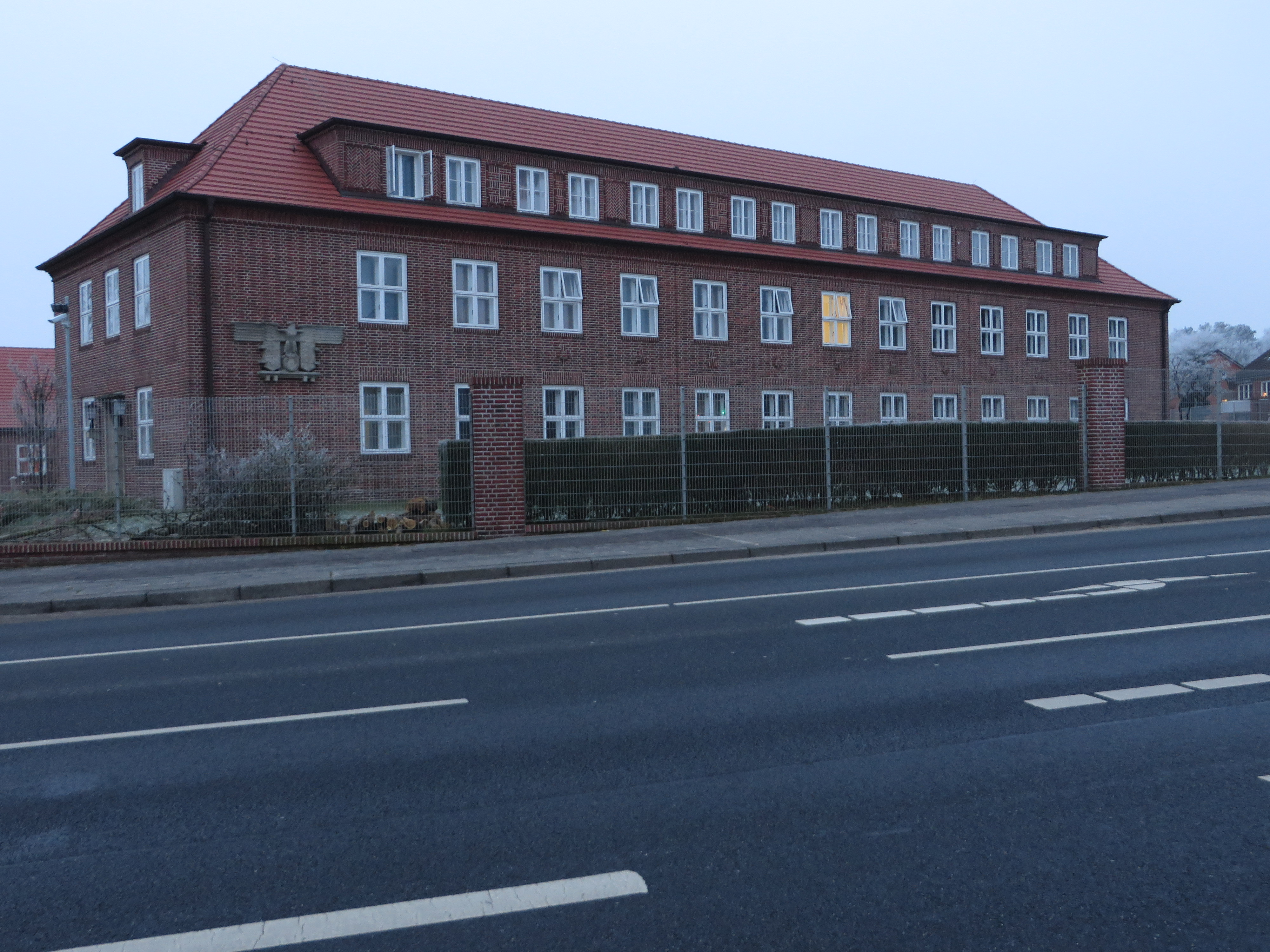 Marinesportschule, ehemaliger Sitz der letzten Reichsregierung (Mürwik Januar 2015); (Kommandeurs- und Unterkunftsbau)